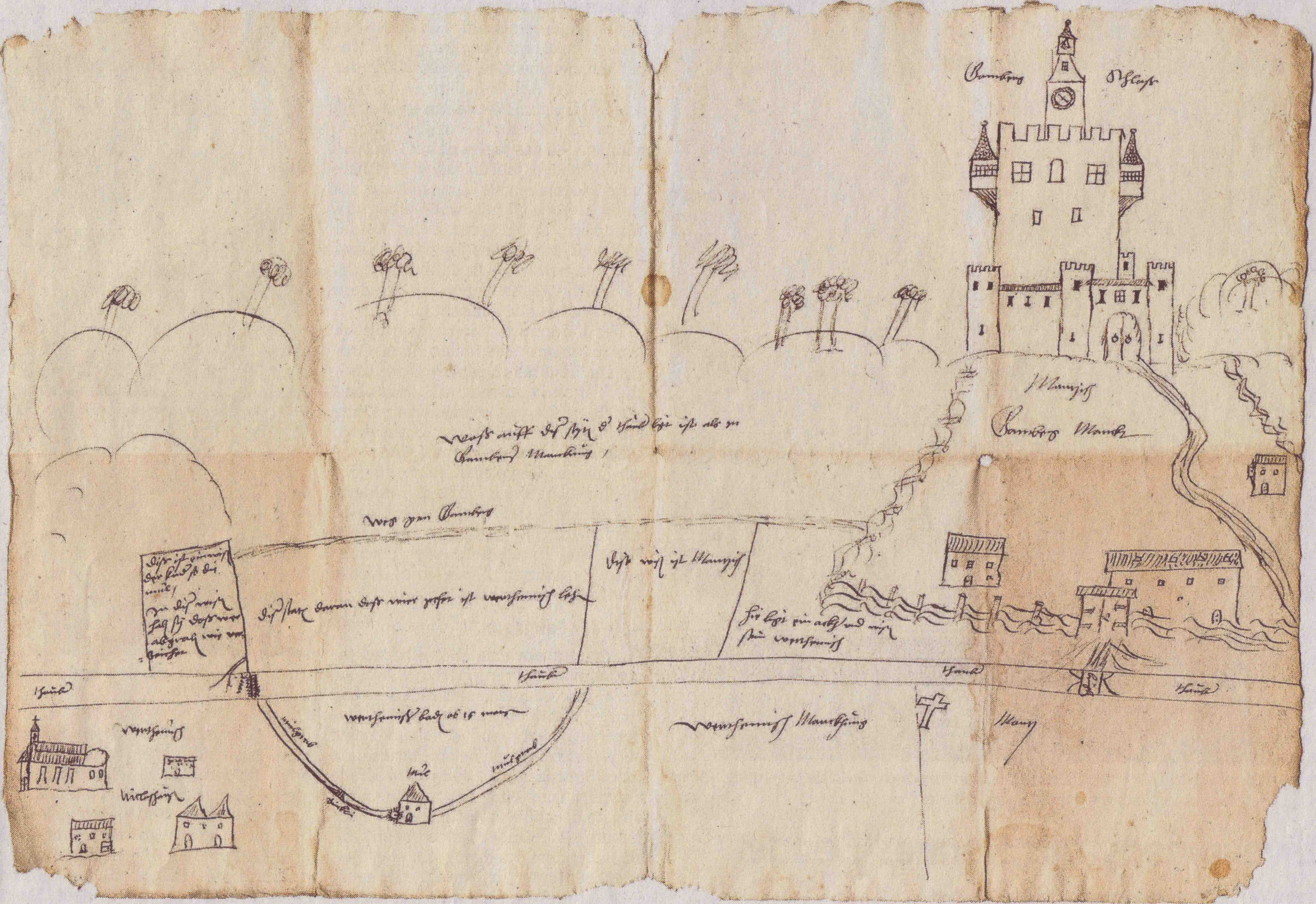 Zeichnung von Niklashausen und Gamburg (um 1530).Links ist Niklashausen mit der Kirche zu sehen, die auf der Zeichnung ohne Dach ist. Sie wurde 1477 zerstört; der 1518 begonnene Wiederaufbau wurde jedoch nicht vollendet und der Chor erhielt sein Dach erst im 19. Jahrhundert. Rechts von Niklashausen ist die Niklashäuser Mühle zu sehen; in der rechten Bildhälfte unten schließlich ein Flurkreuz, das die Grenze zwischen der Gemarkung des kurmainzischen Herrshaftsbereichs und der der Grafschaft Wertheim markierte. Oberhalb des Kreuzes ist - von einem Hagzaun umgeben - der Ort Gamburg angedeutet. Auf dre Zeichnung ist nur das zweiflügelige Taubertor eingezeichnet; das Mühltor, das Krappentor und das Tor zur Flur fehlen. Die Gamburg selbst (hier als Schloss bezeichnet) ist überdimensioniert dargestellt, Palais und Burgkapelle fehlen auf der Zeichnung, obwohl sie zur Entstehungszeit schon vorhanden waren. Die Turmuhr am Bergfried hat vermutlich nie existiert. (Originalformat 30 × 43 cm)